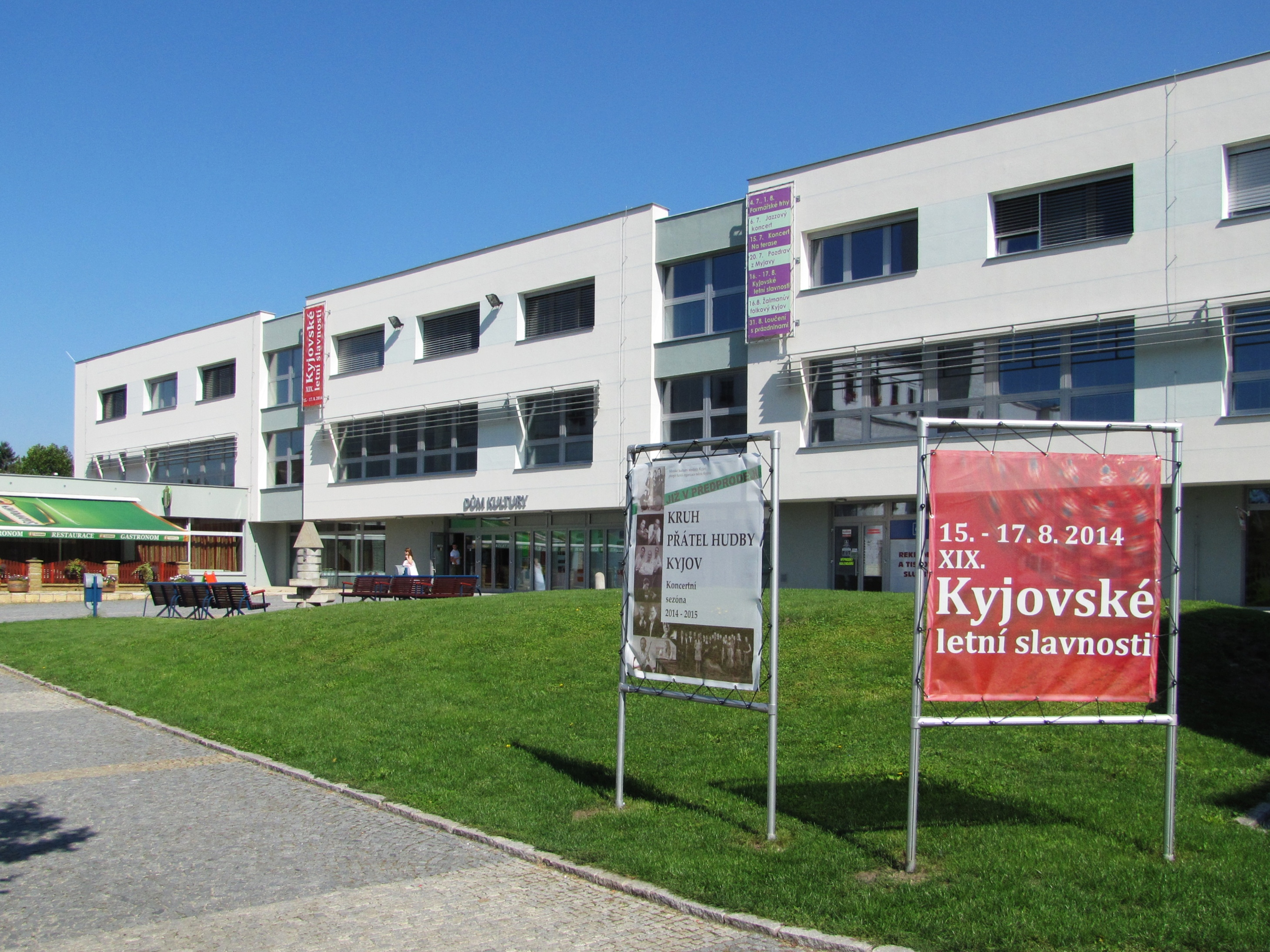 Kulturní dům na Masarykově náměsti v Kyjově z roku 1970